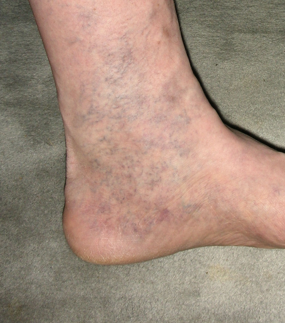 Krampfadern und Besenreiser (netz- und besenartige Venen, sichtbar unter Hautoberfläche)